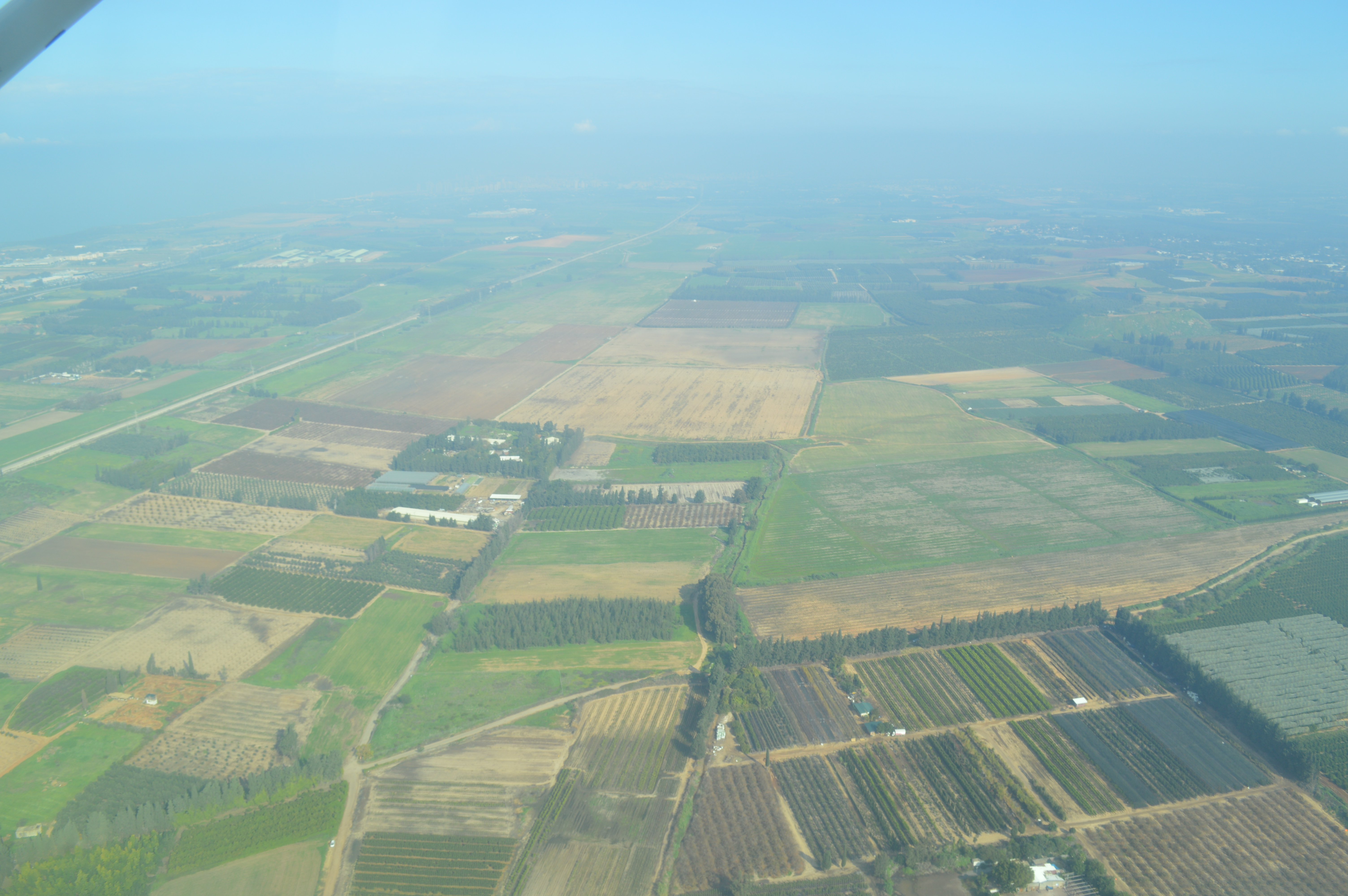 צילום אוויר - אזור השרון